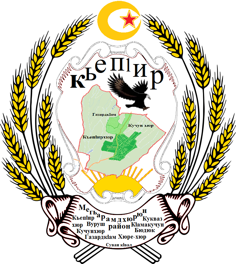 герб села Кабир-Казмаляр собственная разработка Джавидина